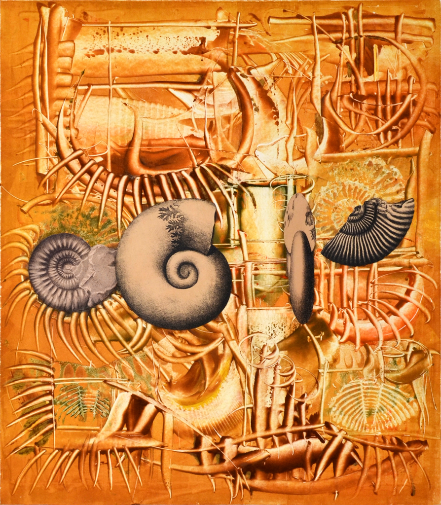 Oldřich Hamera, Bez názvu, monotyp a autokoláž, 38,5x34 cm, 2002